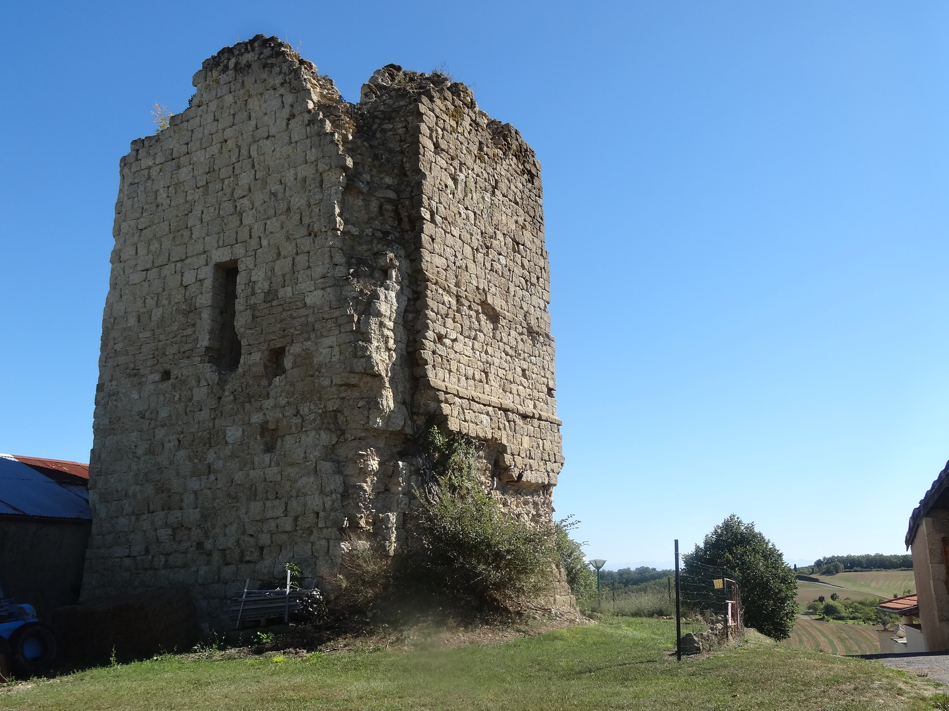 Tour en ruine à Lasseube-Propre